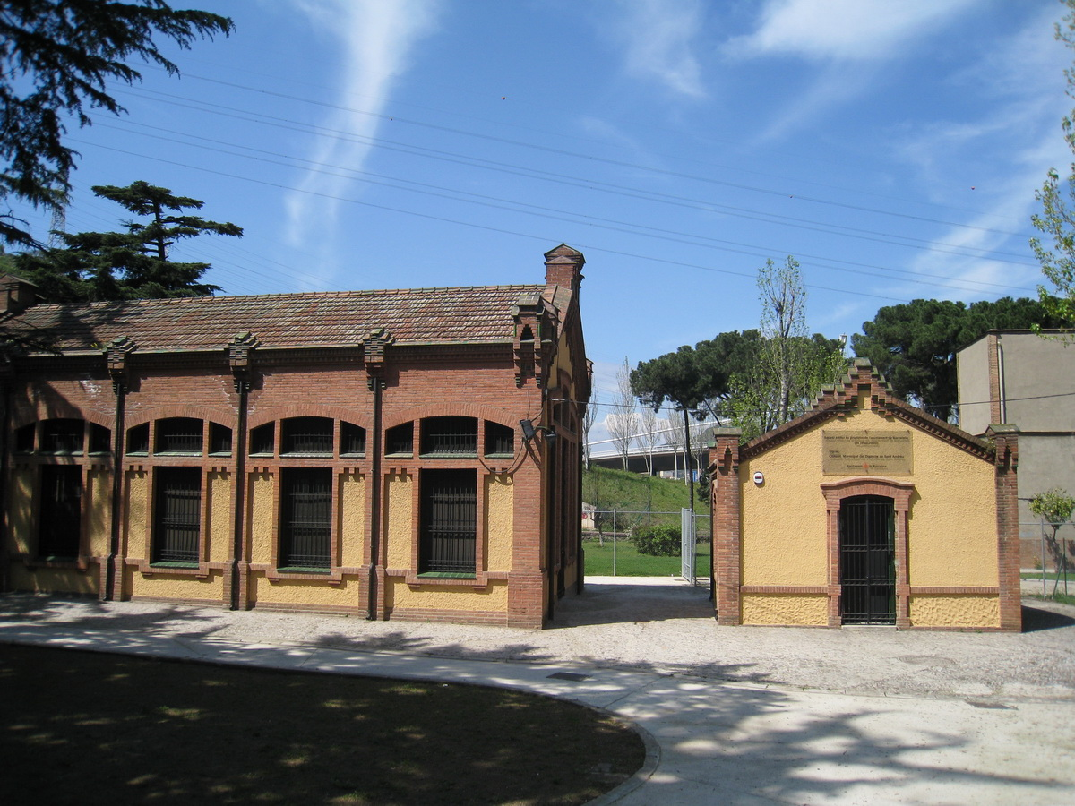 Antic central de bombament d'aigua cap a la planta depuradora d'aigües de Montcada (Casa de l'Aigua) per abastir Barcelona. Obra de Pere Falqués del 1915 (Ctra. Ribes 103-111, Barcelona-Catalunya)